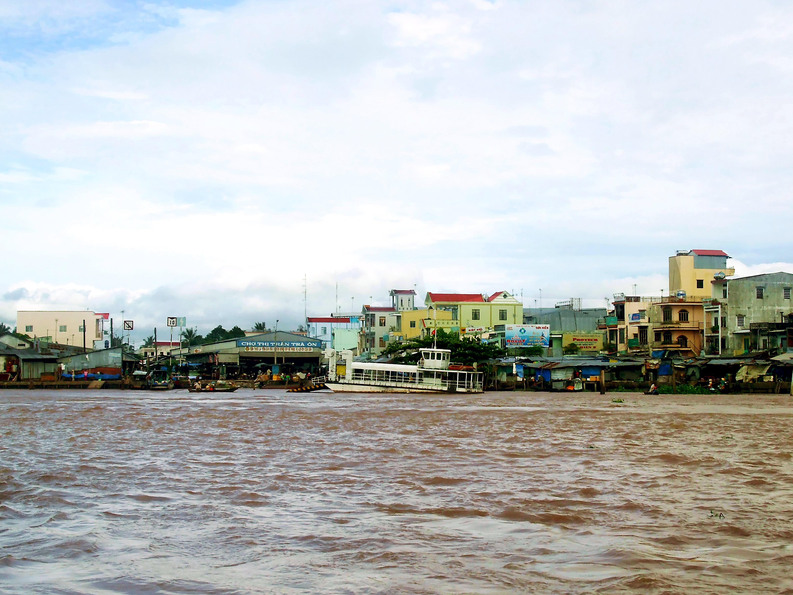 Khu chợ thị trấn Trà Ôn (Vĩnh Long, Việt Nam) bên dòng sông Măng Thít